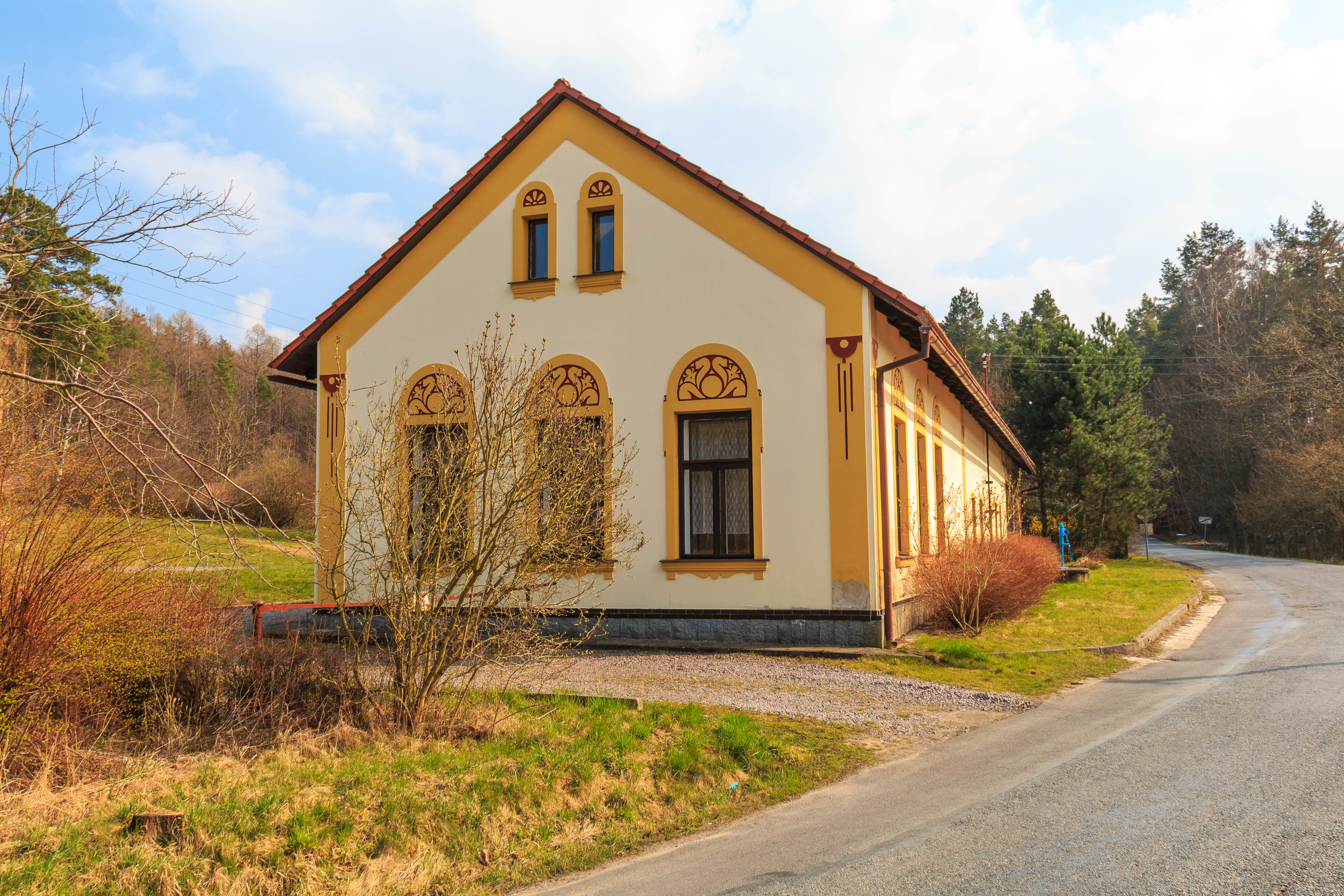 Studená Voda č. 7